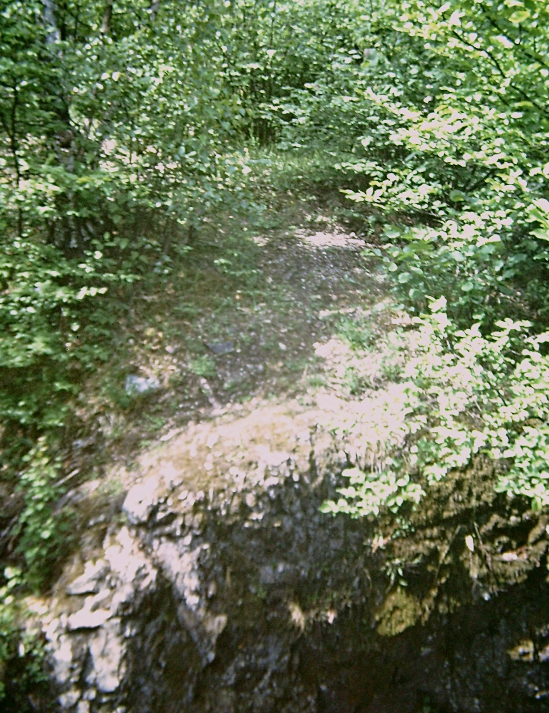 Fossé entre les deux rochers du chateau